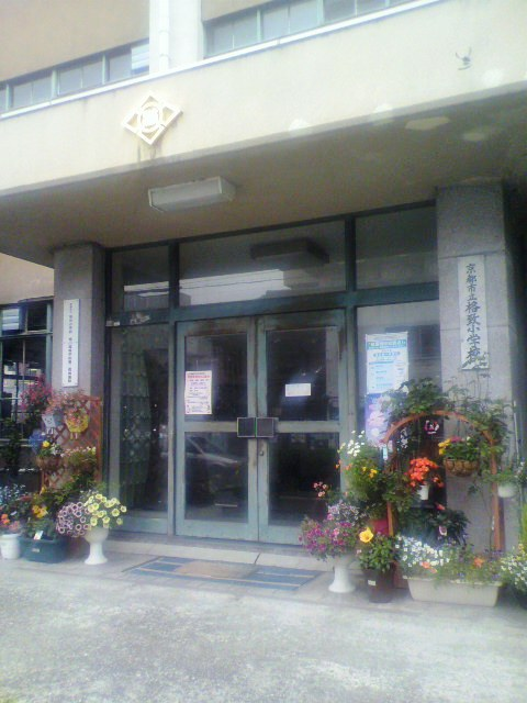 旧京都市立格致小学校玄関